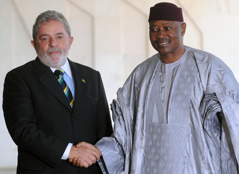 Brasília - O presidente Luiz Inácio Lula da Silva recebe o presidente do Mali, Amadou Tomani Touré, em visita oficial ao país (Antonio Cruz/ABr)